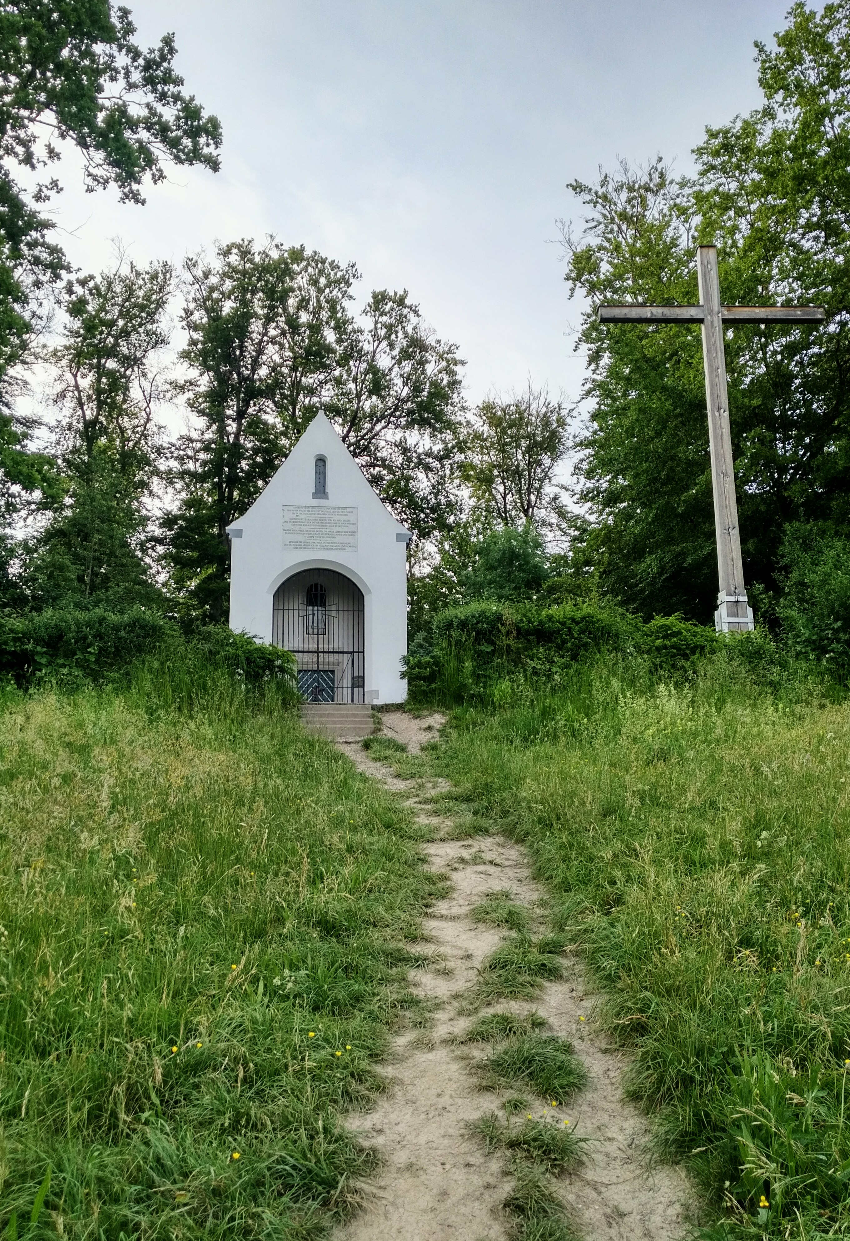 Die Kapelle auf dem Riesenberg in Konstanz, gesehen vom Weg über die Wiese beim Aufstieg.